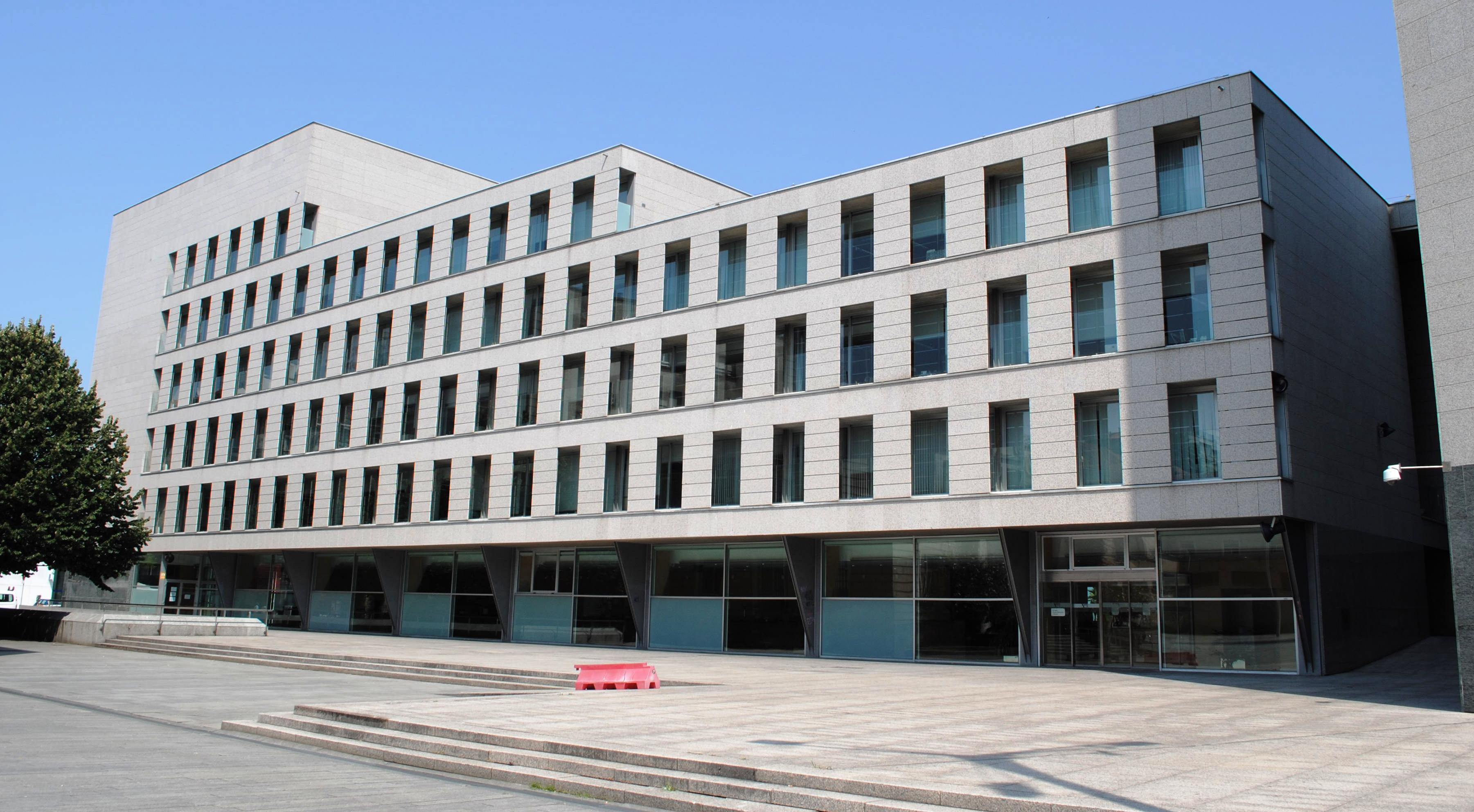 Arquitectos Esteve Bonell y Josep María Gil (1995).